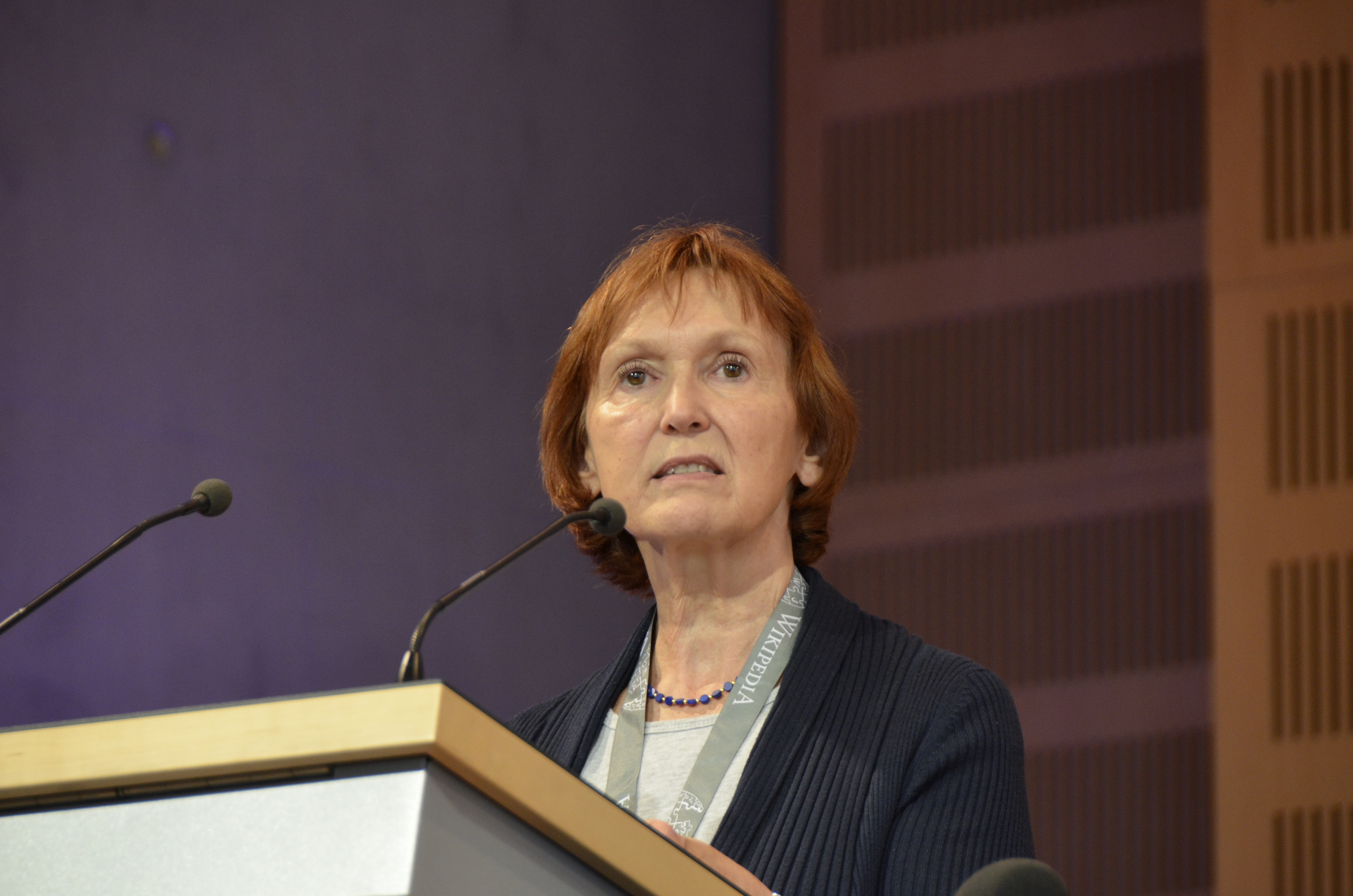 Ute Schwens bei Zugang gestalten in der Deutschen Nationalbibliothek.